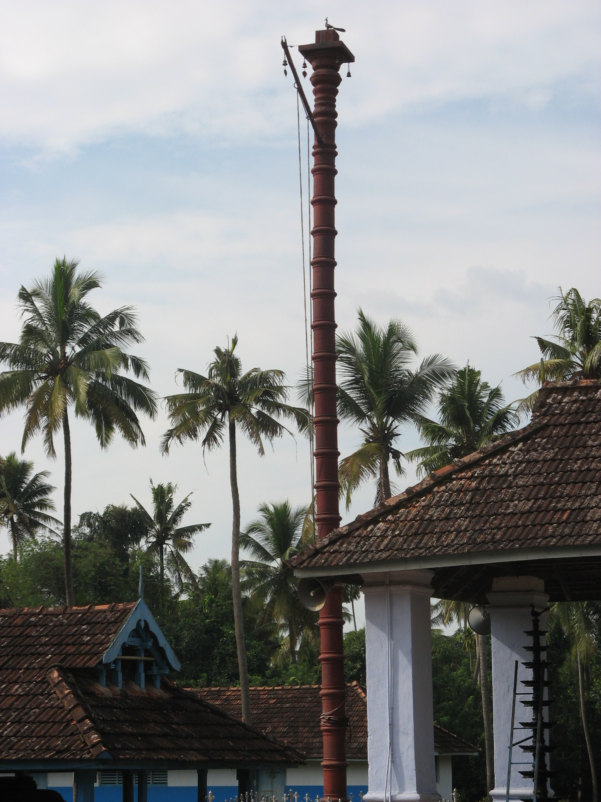 കൊടിമരം-കുഴൂർ ശ്രീ സുബ്രമണ്യ സ്വാമി ക്ഷേത്രം